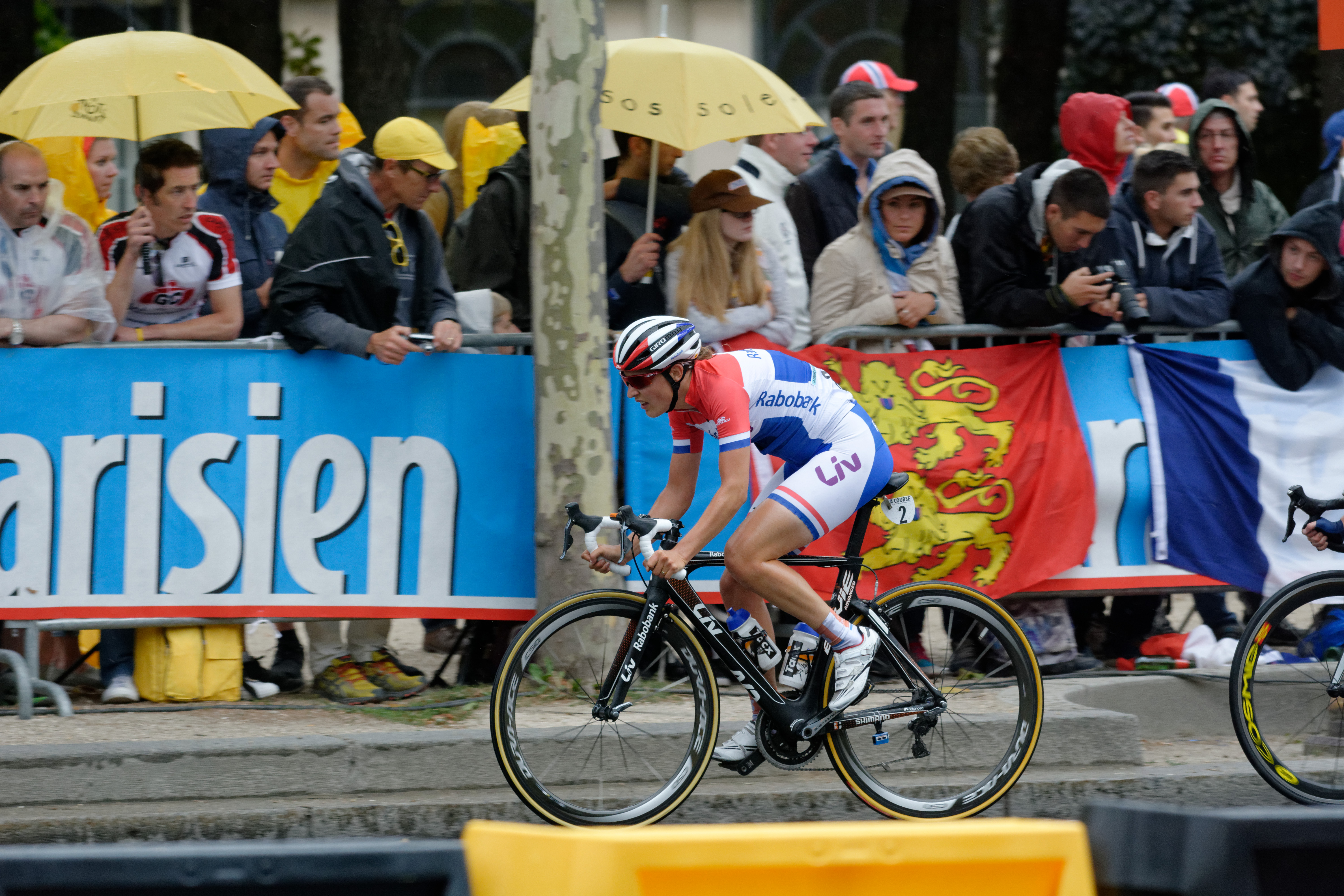 D71_1840_DxO